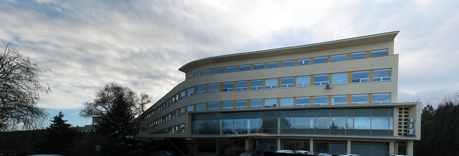 Chemický ústav SAV Bratislava, 1962